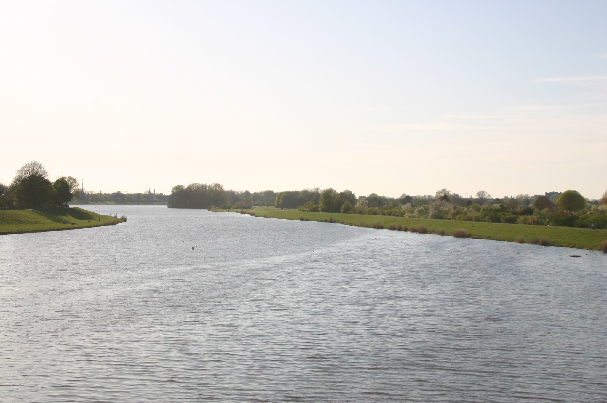 Werdersee, von Erdbeerbrücke aus